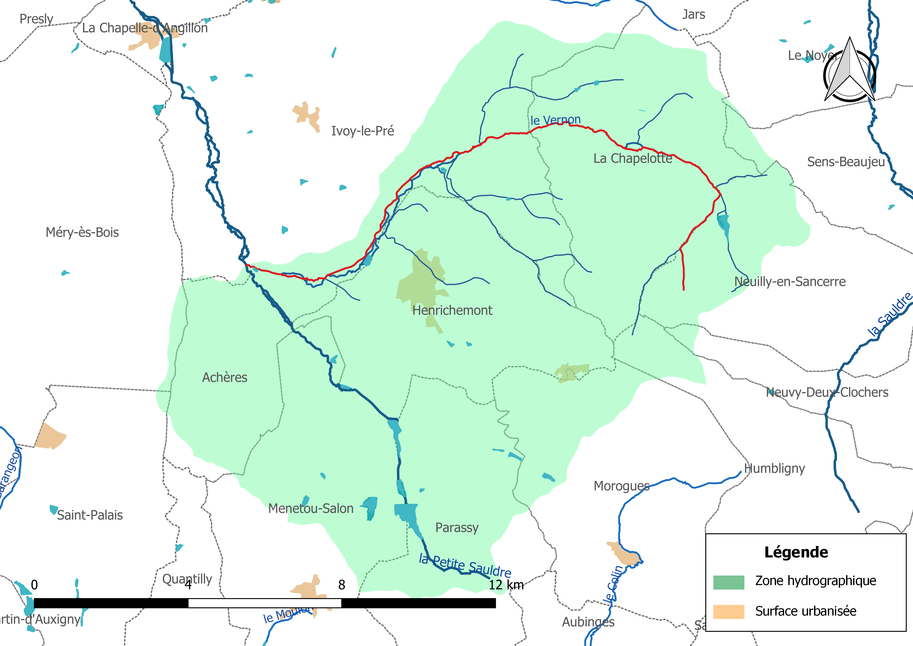 Carte du cours d'eau « le Vernon » (France) et de la zone hydrographique dans laquelle il s'insère.